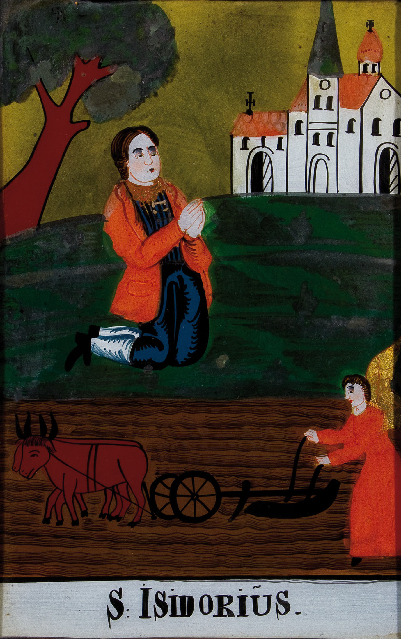 Hl. Isidor (Agricola), Hinterglasbild, 32,5 x 24,5 cm; Sandl, 1. Hälfte 19. Jahrhundert